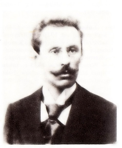 Dawid Janowski (ur. 7 czerwca 1868 w Wołkowysku, zm. 15 stycznia 1927 w Hyeres we Francji) – francuski szachista polskiego pochodzenia, uczestnik meczu o mistrzostwo świata z Emanuelem Laskerem.